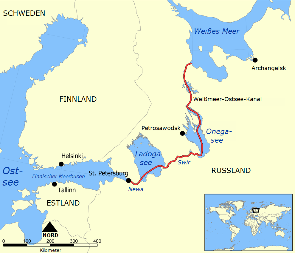 Diese Karte zeigt den Verlauf des Weißmeer-Ostsee-Kanals.